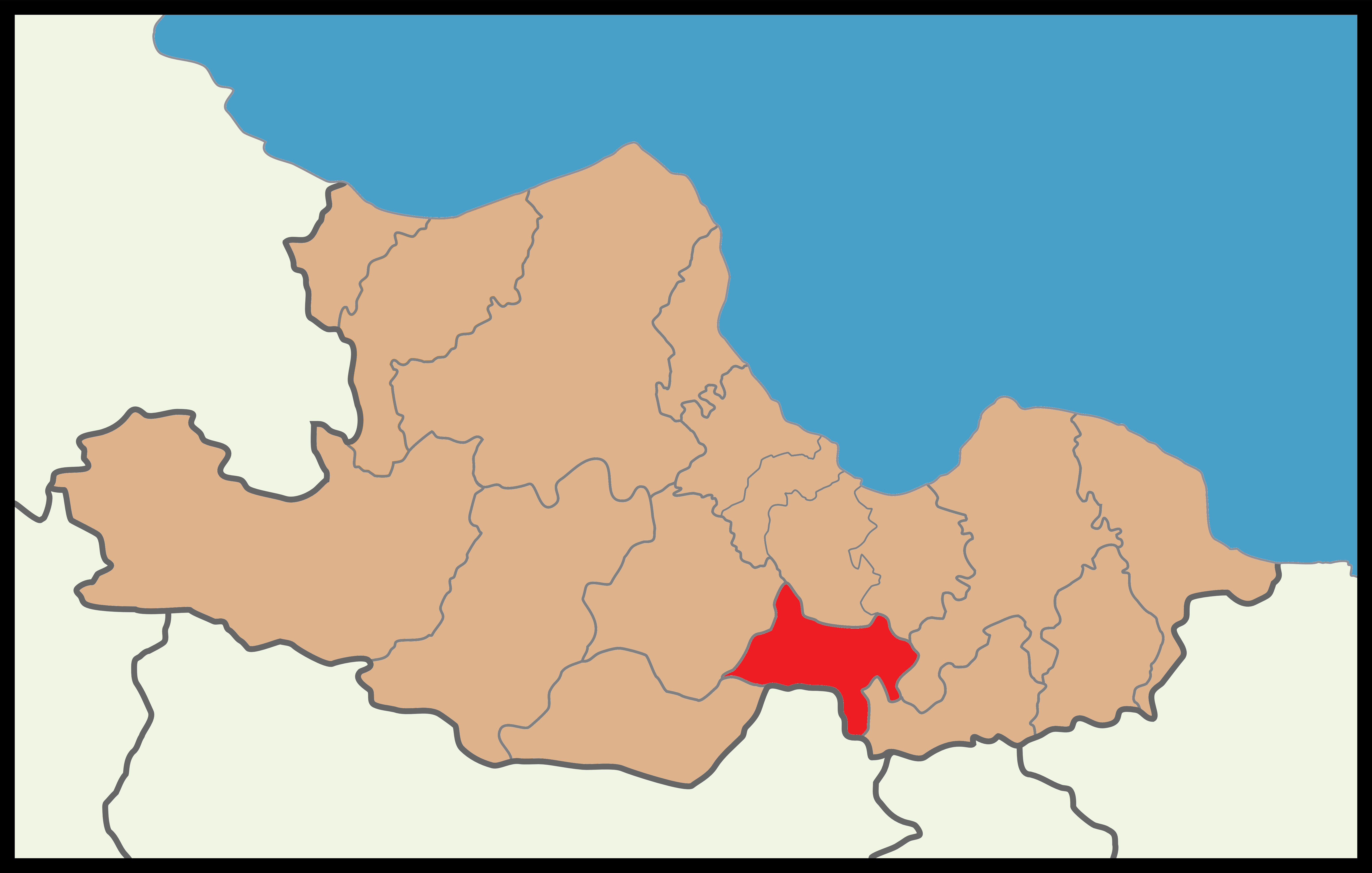 Samsun'un Asarcık ilçesinin 2019 Türkiye yerel seçimleri haritası.